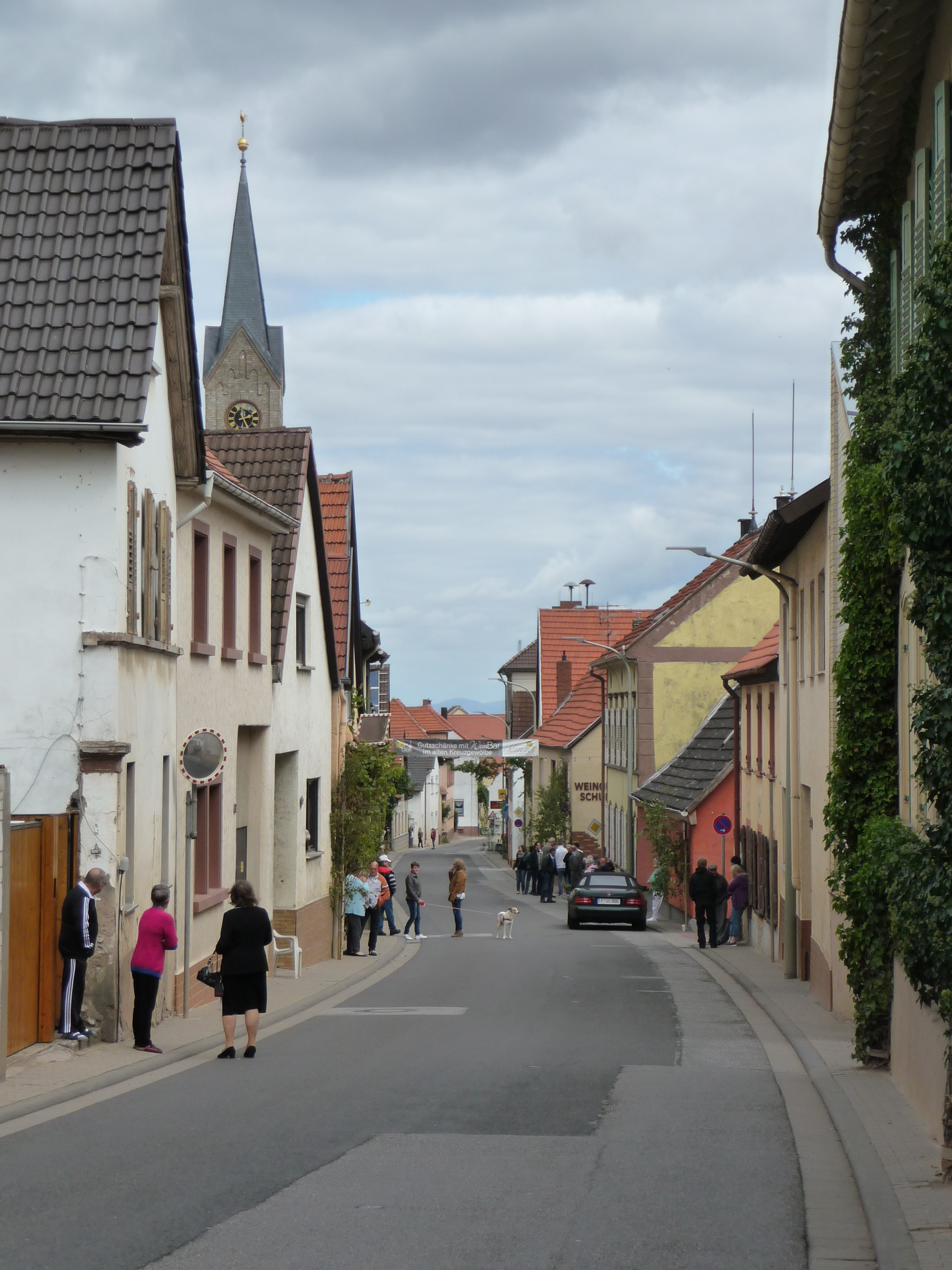 Kindenheim